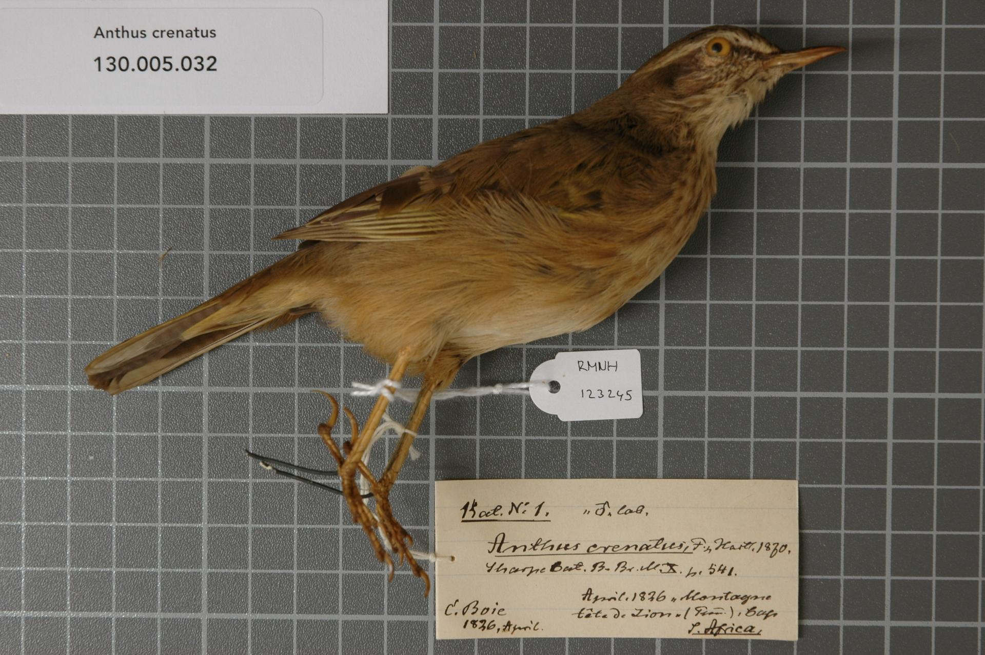 Anthus crenatus Finsch & Hartlaub, 1870